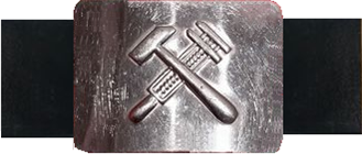 Ремень мпс 43